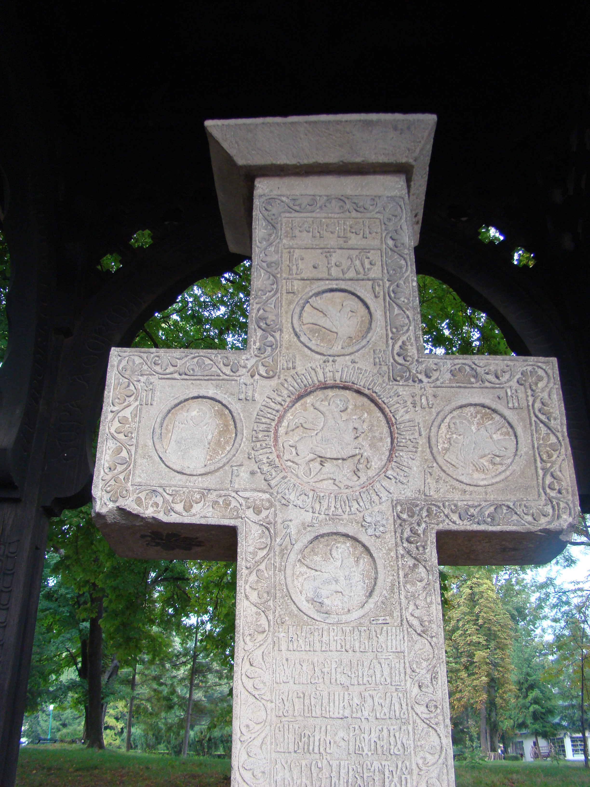 Cruce de piatră (Str. Basarabilor 1, în incinta Mănăstirii Argeșului)